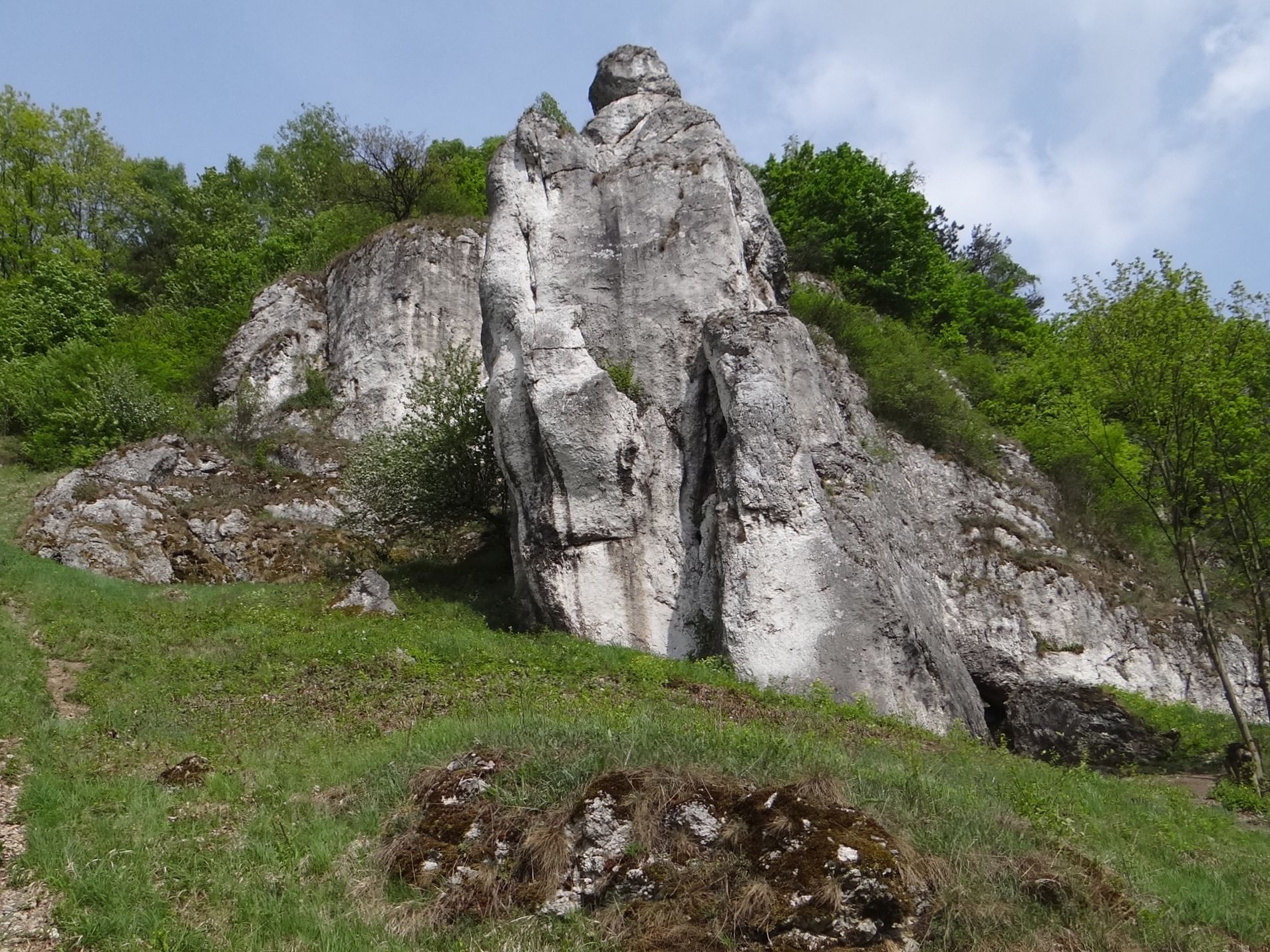 Wysoka Płyta iTurnia z Krokiem w Dolinie Kobylańskiej